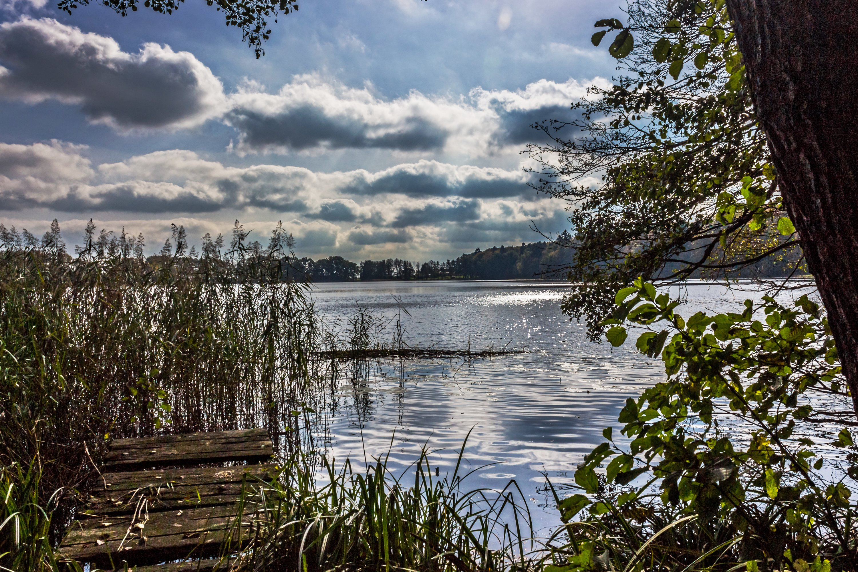 Großer Plunzsee am Grumsiner Wald